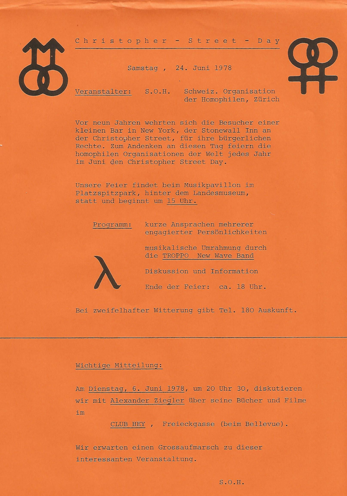 CSD Ankündigung Zürich, 1978